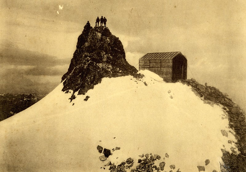 Le refuge de l'Aigle vers 1910